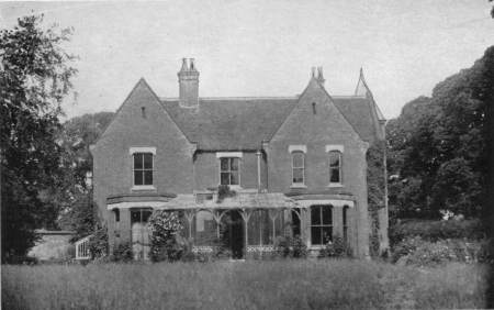 Rectoria borley